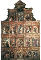 Zizur Nagusiko erretaula